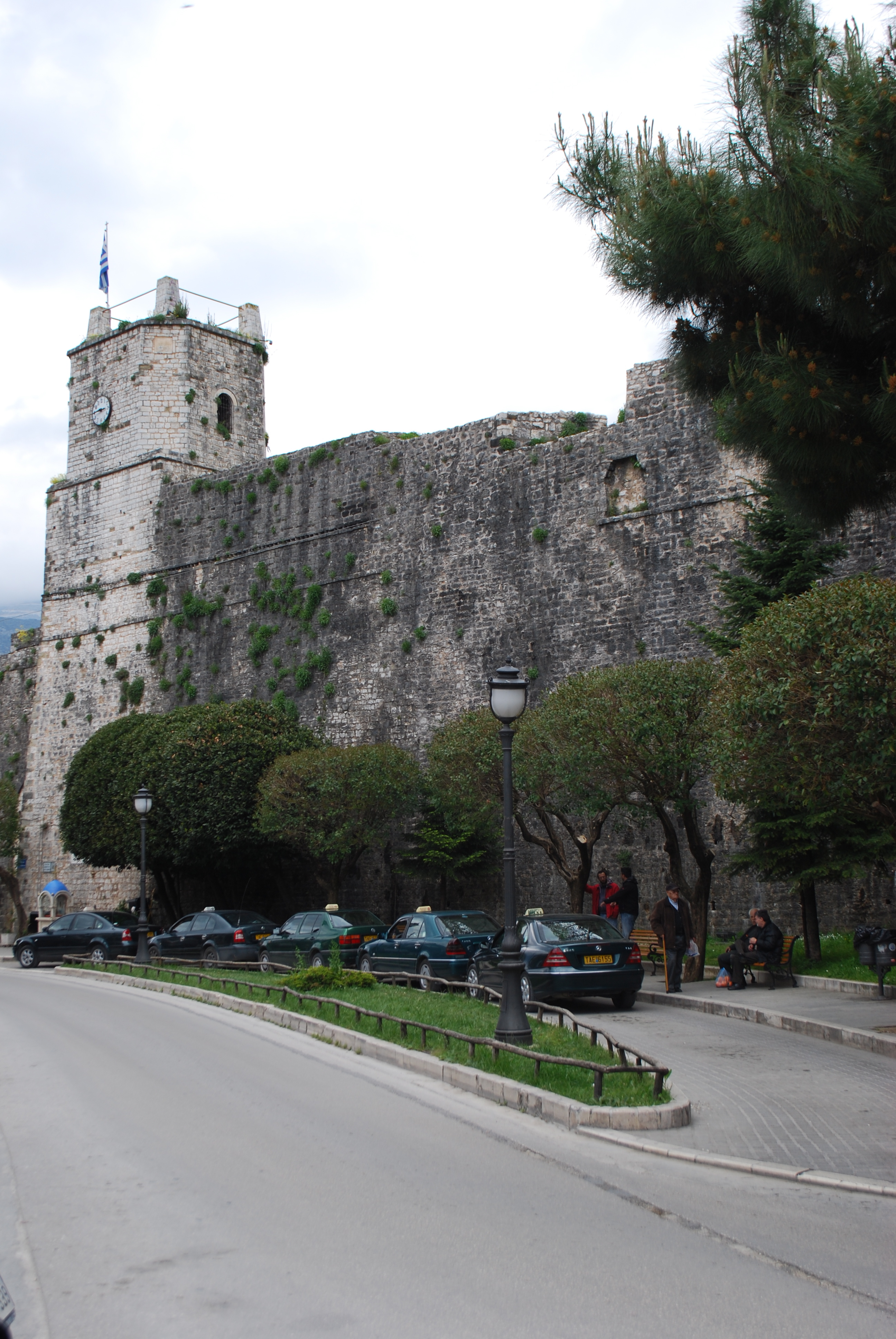 Vue de Ioannina.